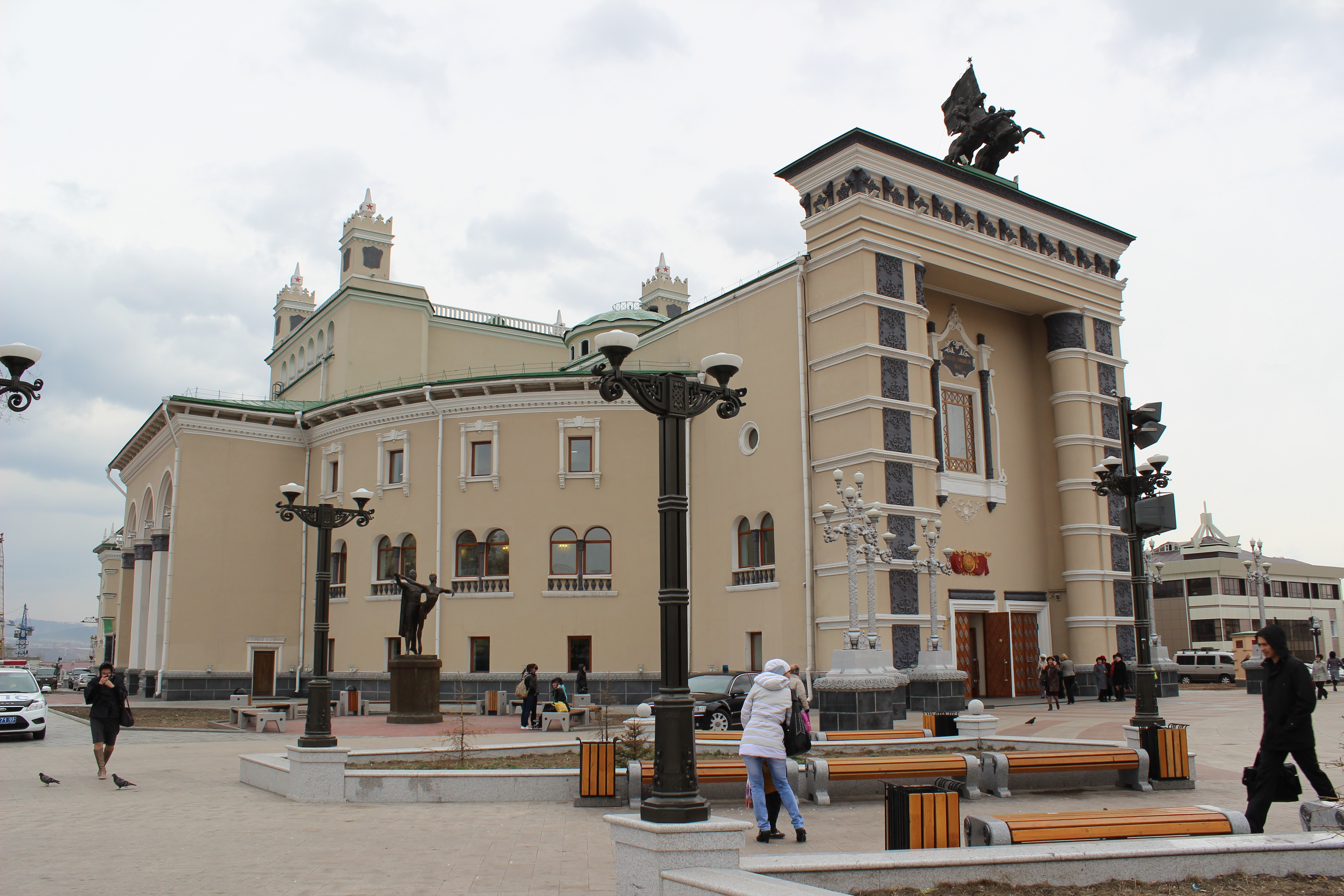 Бурятский государственный академический театр оперы и балета имени Г. Цыдынжапова